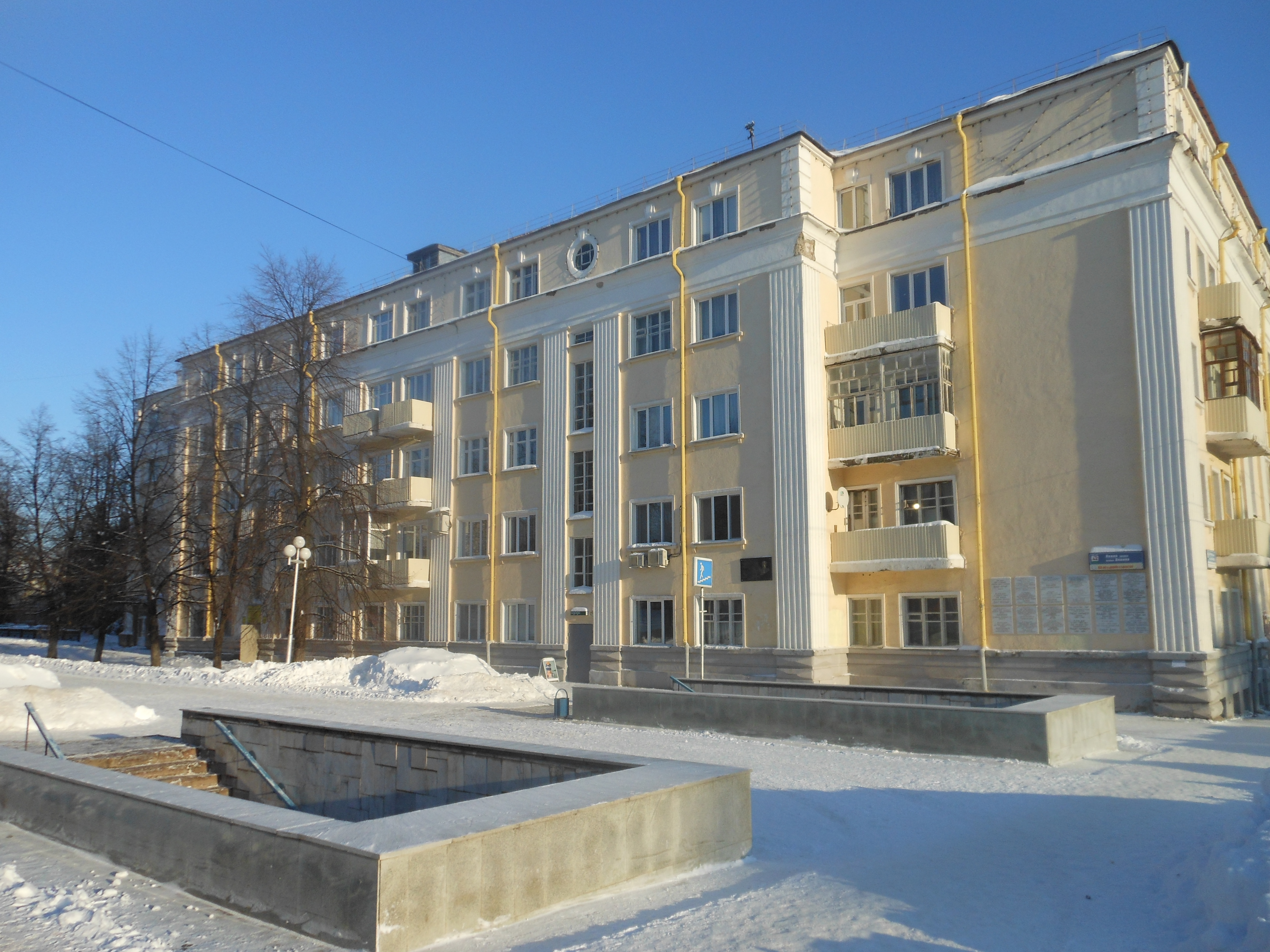 Со стороны подземного перехода